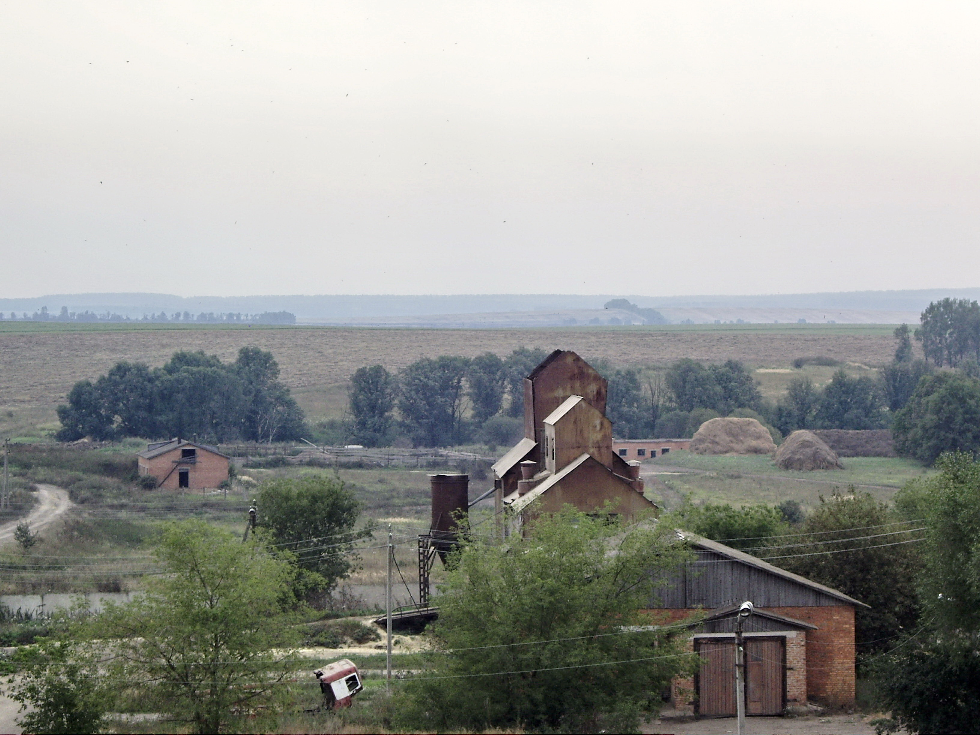 Ефремов. Зерносушилка в Молчаново. 28/08/2008г.